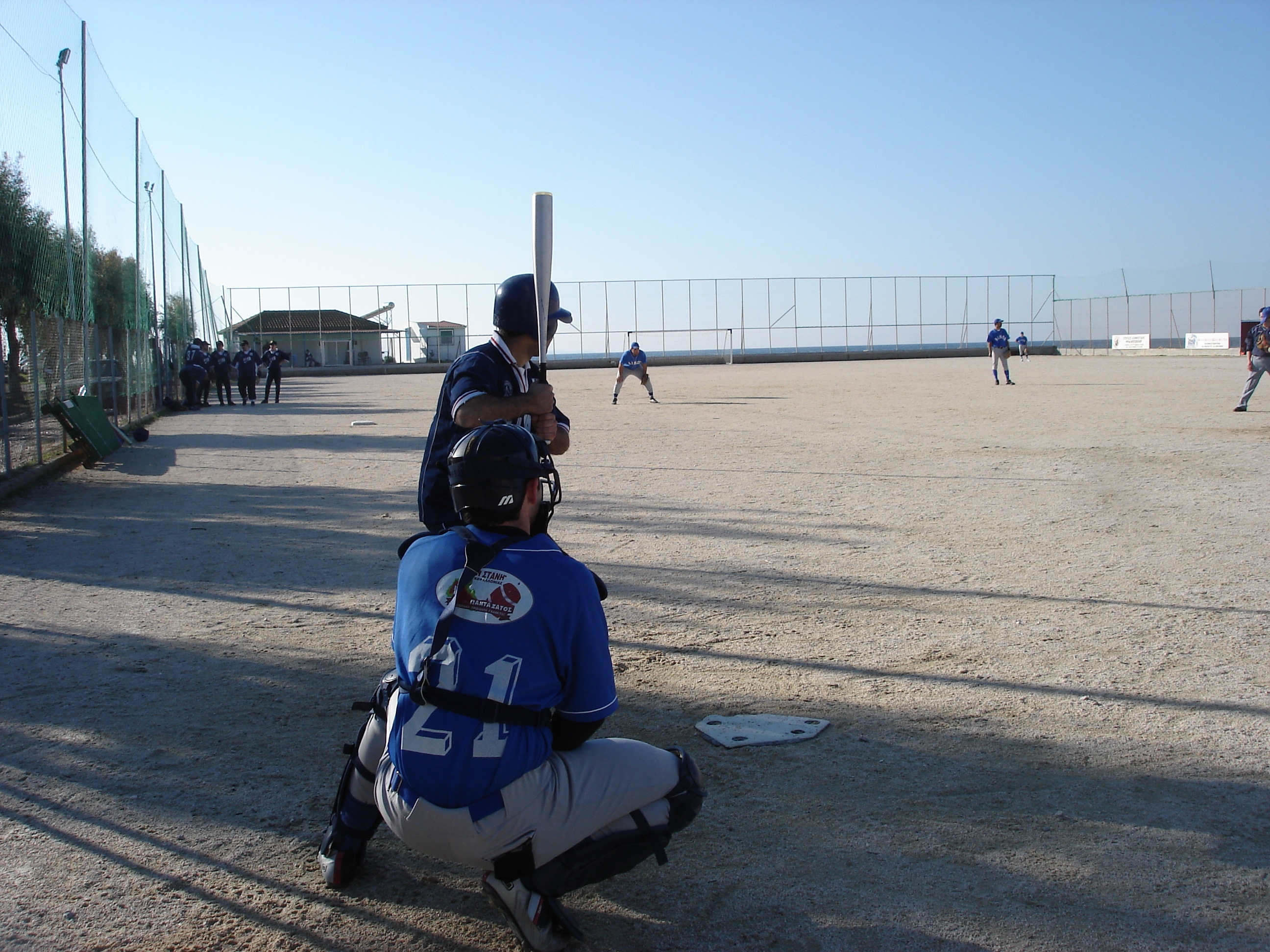 Grecce Baseball champion Dias Patras-Ainos Kefalonias 0-16 Patra Greece Ελληνικό πρωτάθλημα Μπέιζμπολ 2008 Δίας Πάτρας - Αίνος Κεφαλληνίας 0-16